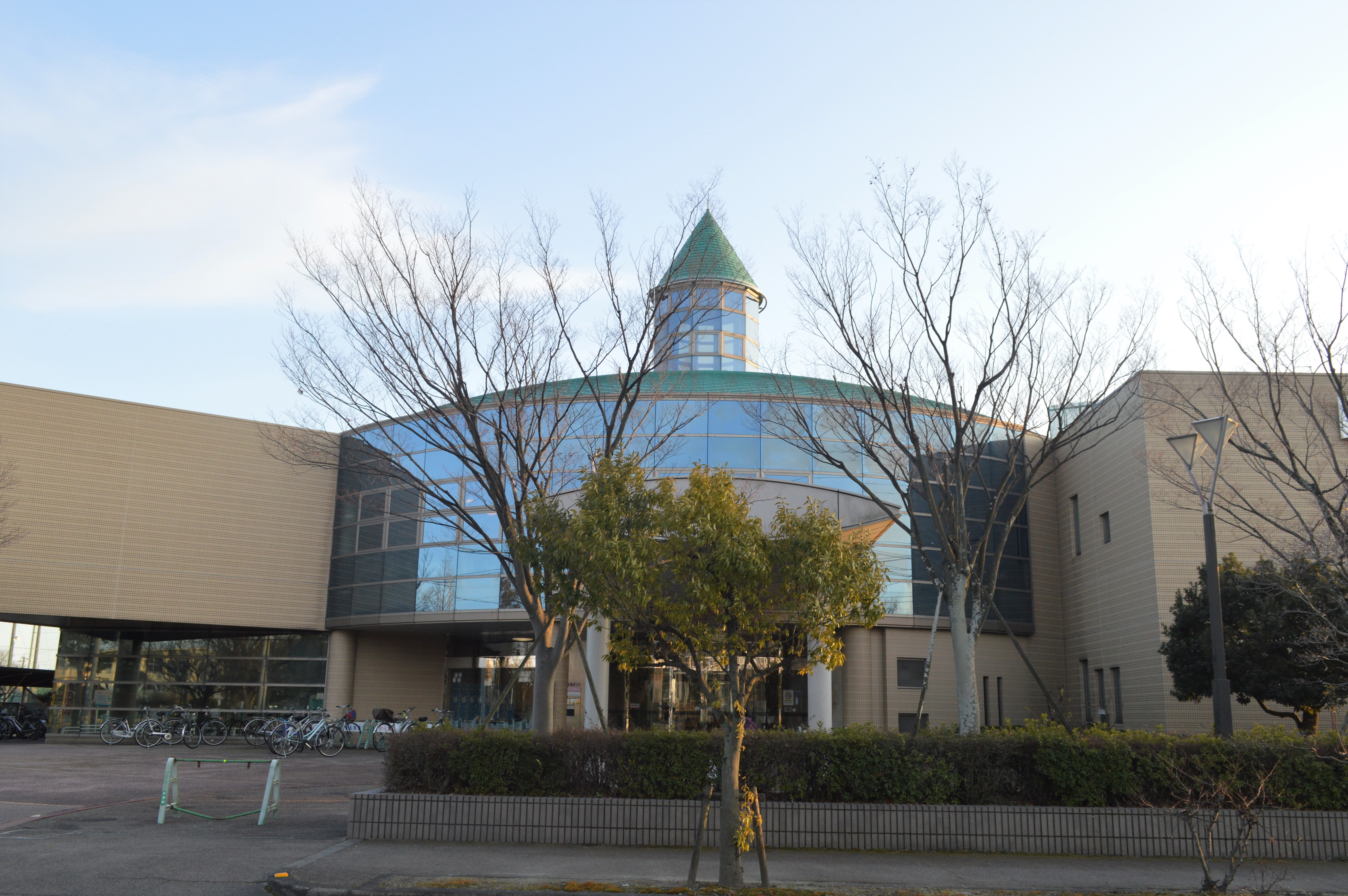 愛知県愛西市の愛西市中央図書館。